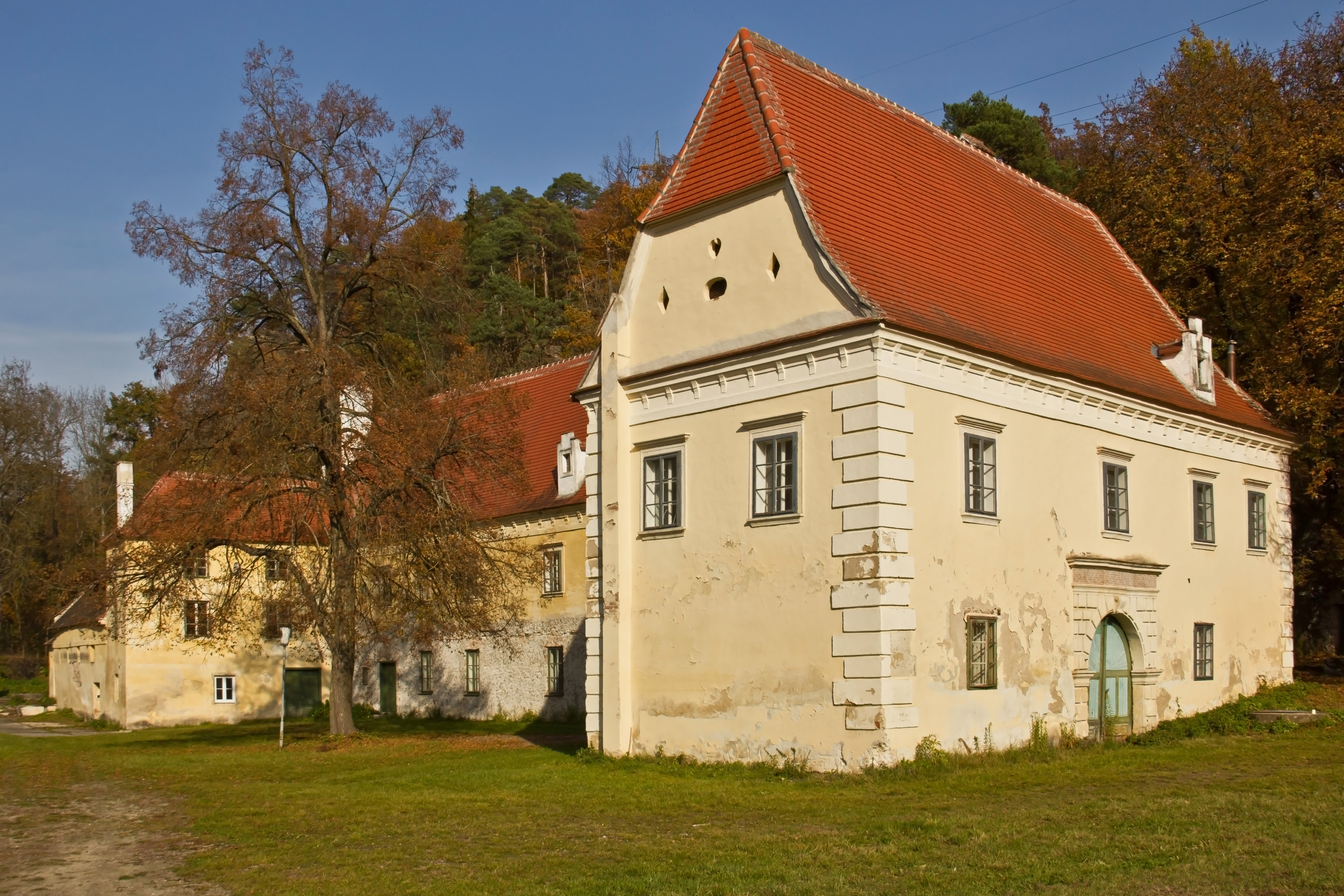 Die ehemalige Rauschermühle war lange Zeit Sommersitz des Altenburger Abtes. Sie wurde 1613 von Abt Thomas Zienner erworben.